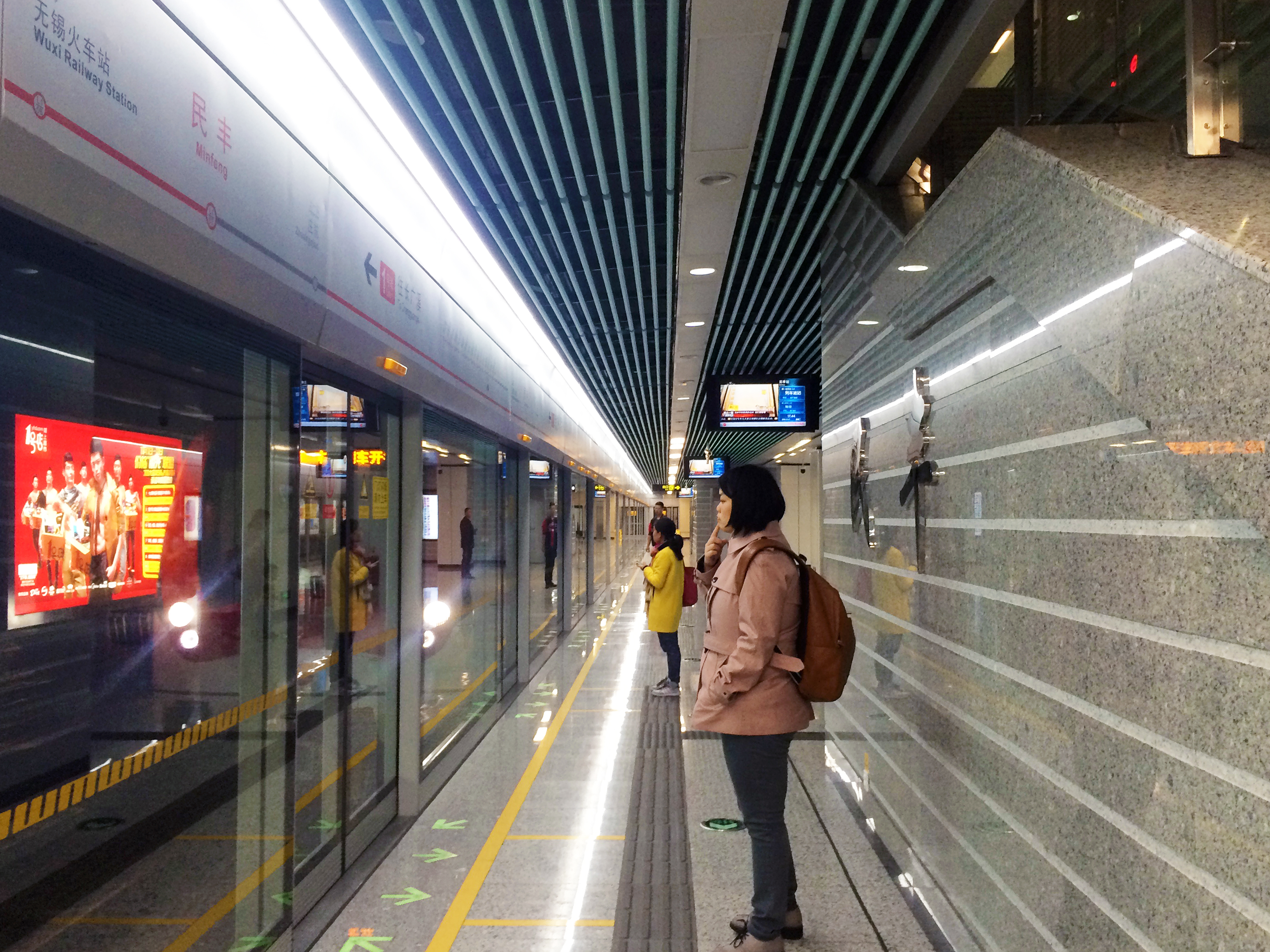 無錫地鐵民豐站月臺